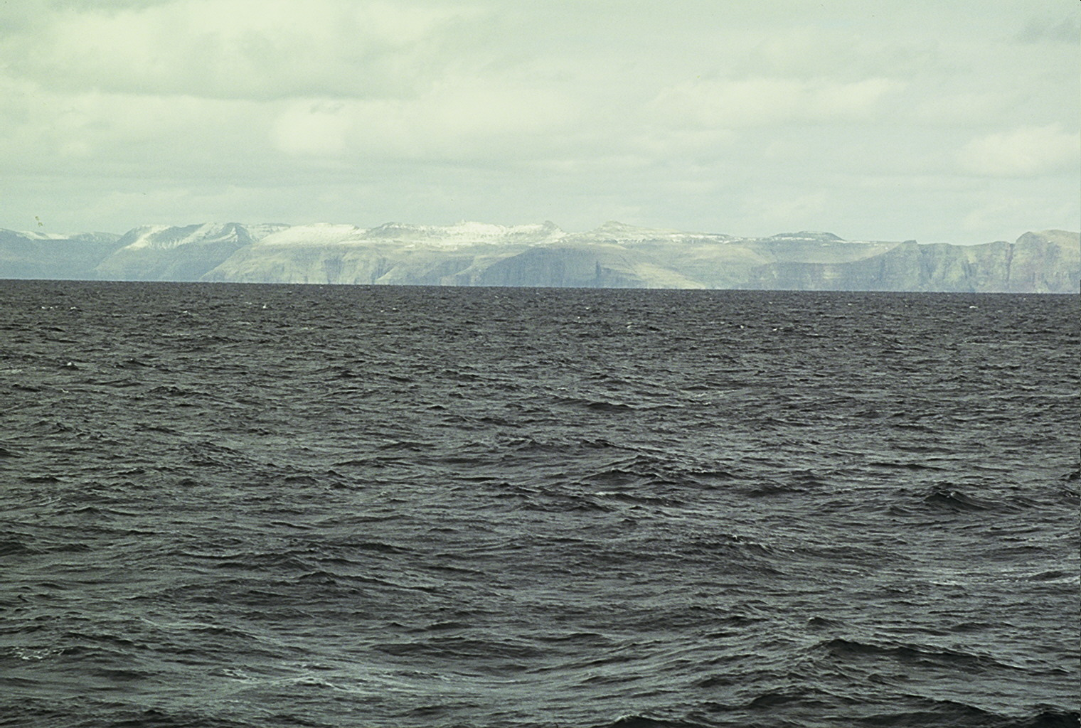 Blick auf die Südküste Islands